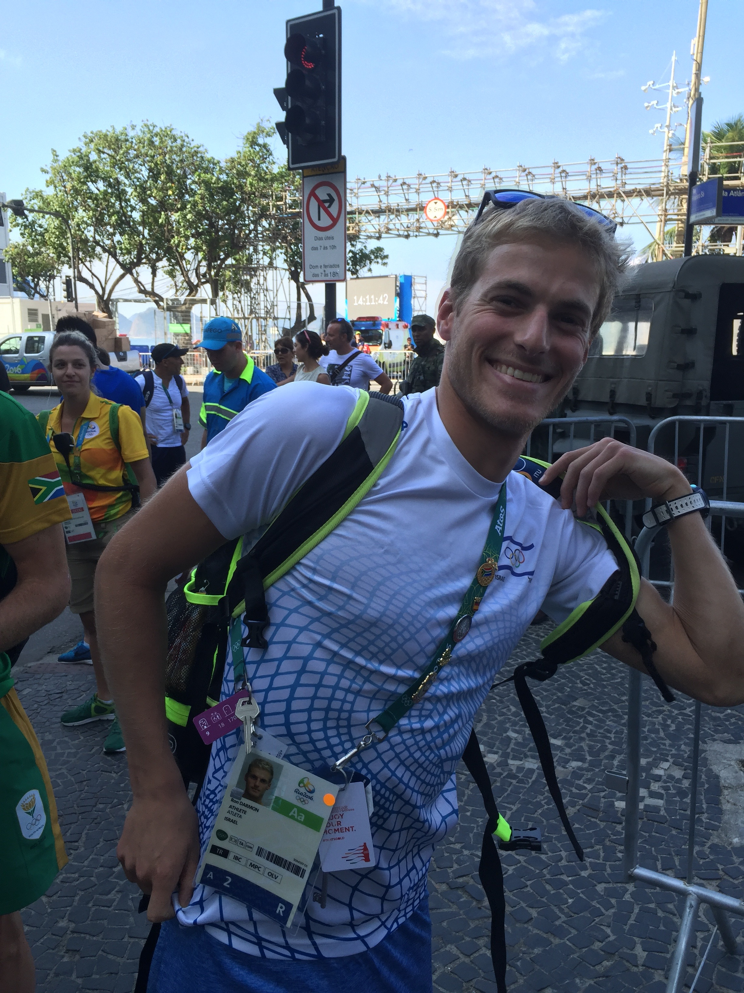 רון דרמון ביום ההכנות לתחרות באולימפידת ריו 2016